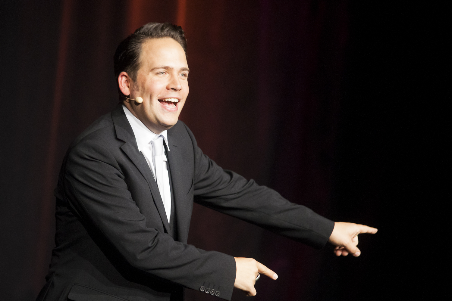 Christoph Tiemann bei der Premiere seines zweiten Kabarett-Programms "Jetzt wird's gewöhnlich" am 14.09.2013